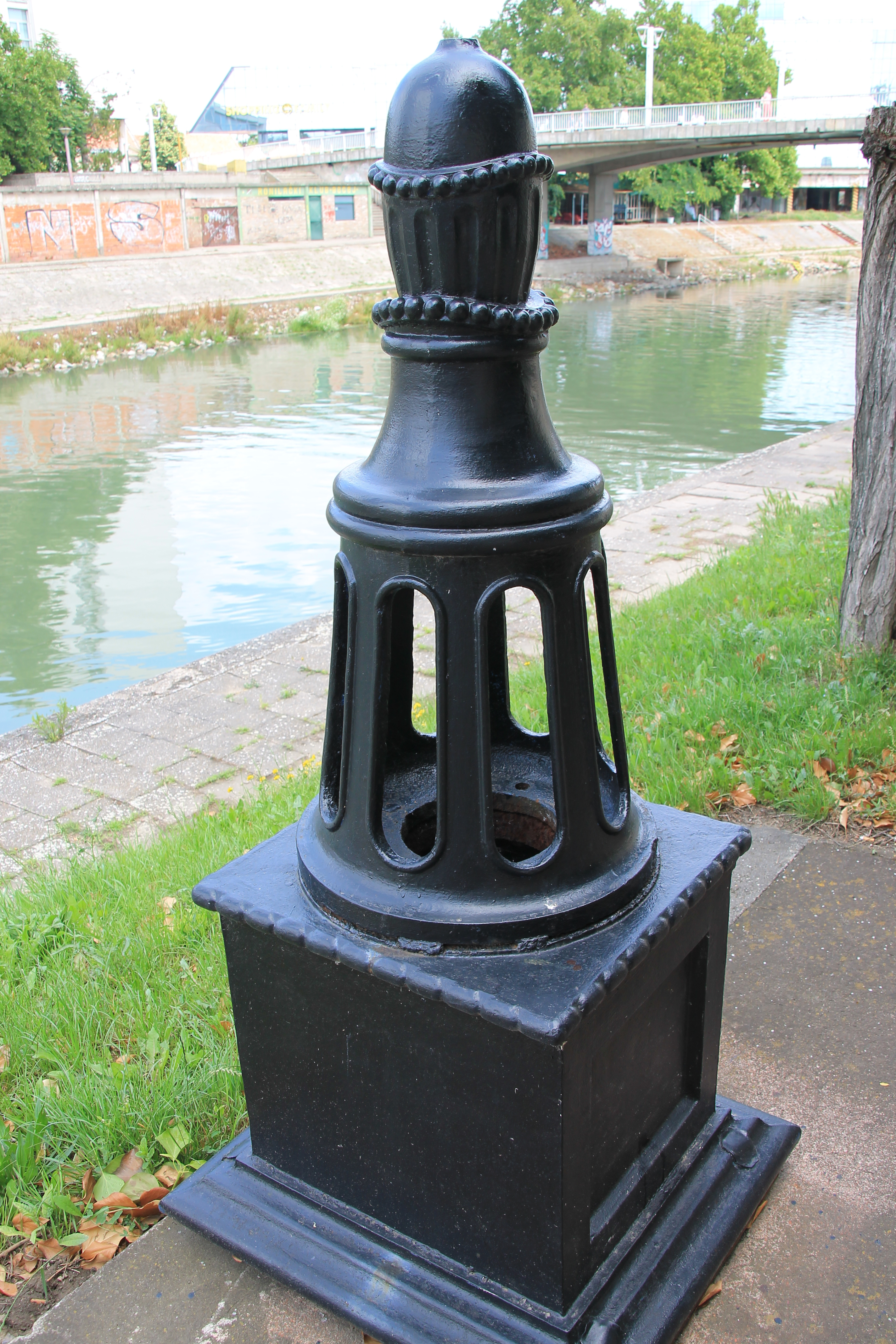 Muzej piva